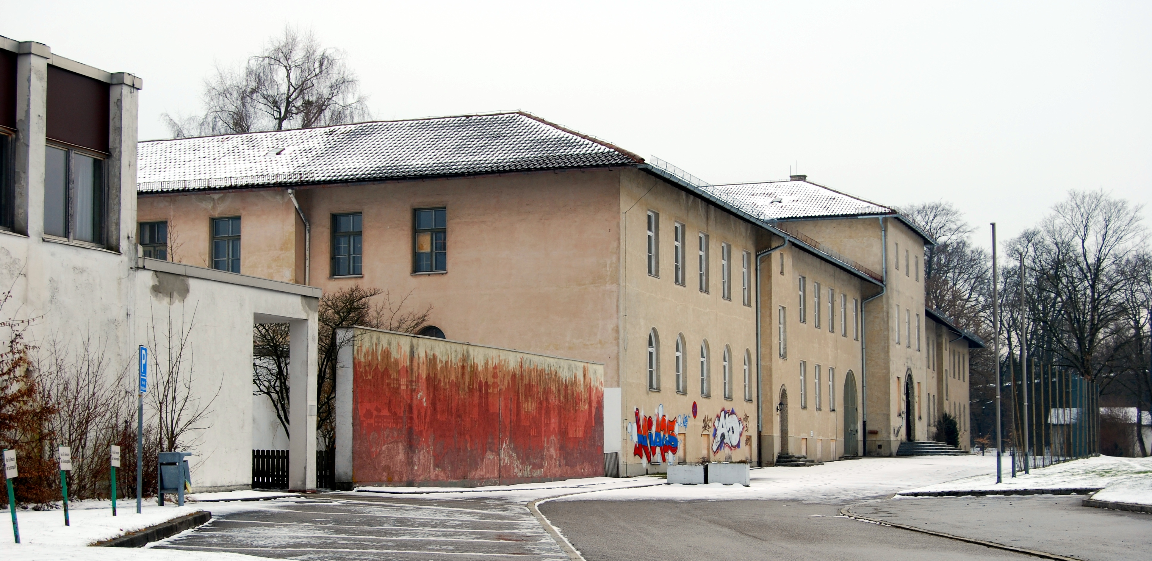 Gebäude der ehemligen Heilanstalt Neufriedenheim, später Bayerische Landesschule für Gehörlose